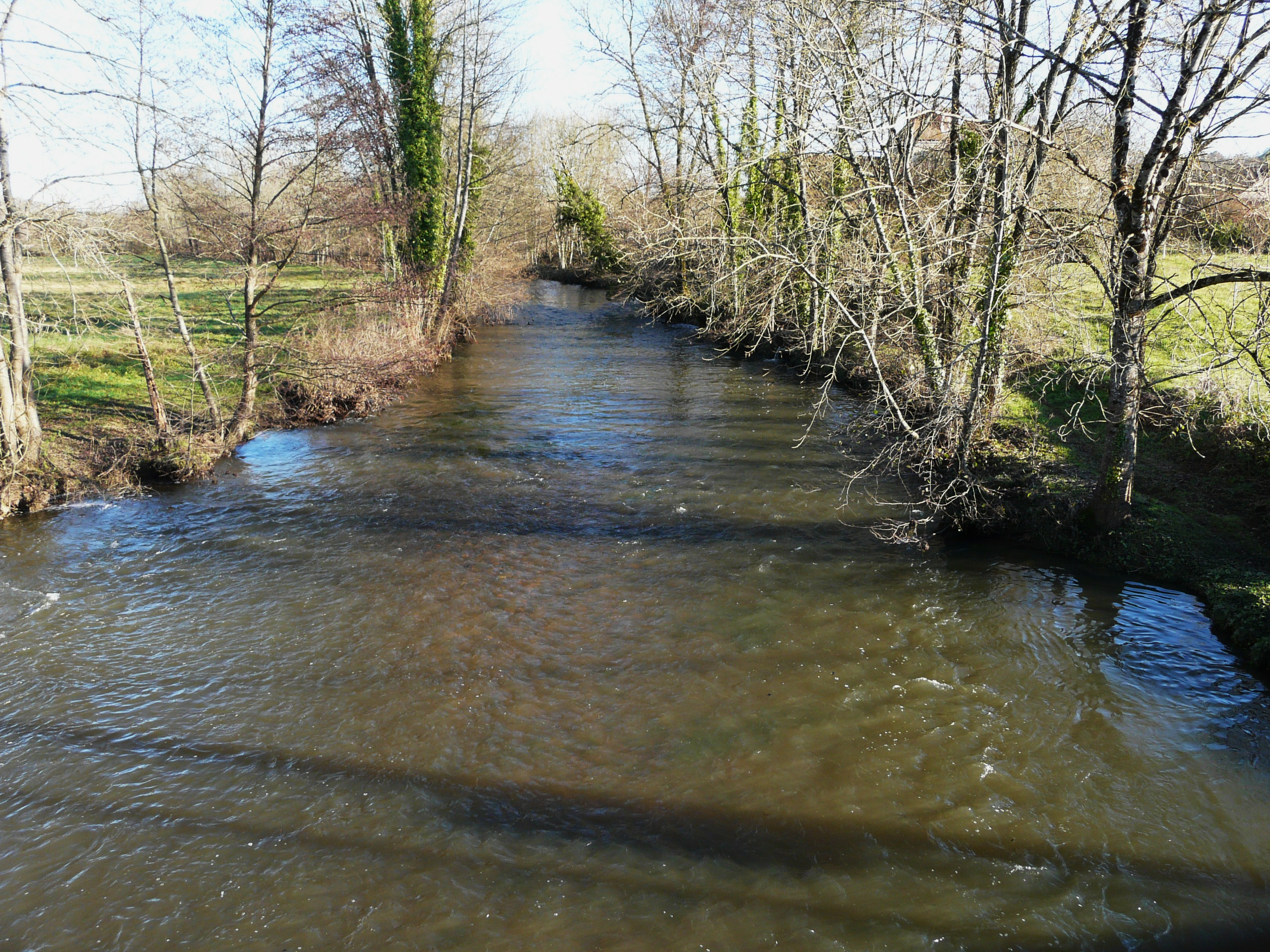 La Côle à Valade (vue vers l'amont), Condat-sur-Trincou, Dordogne, France